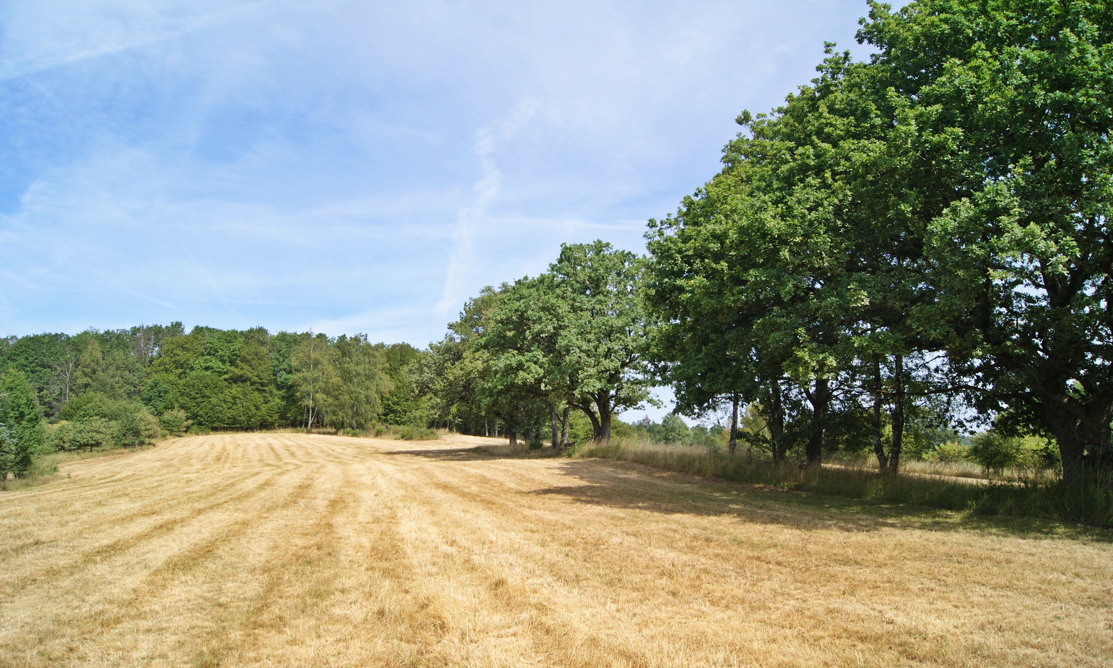 Naturschutzgebiet Süselberg, Niederndorf, Südwestfalen, im Juli nach der Mahd.